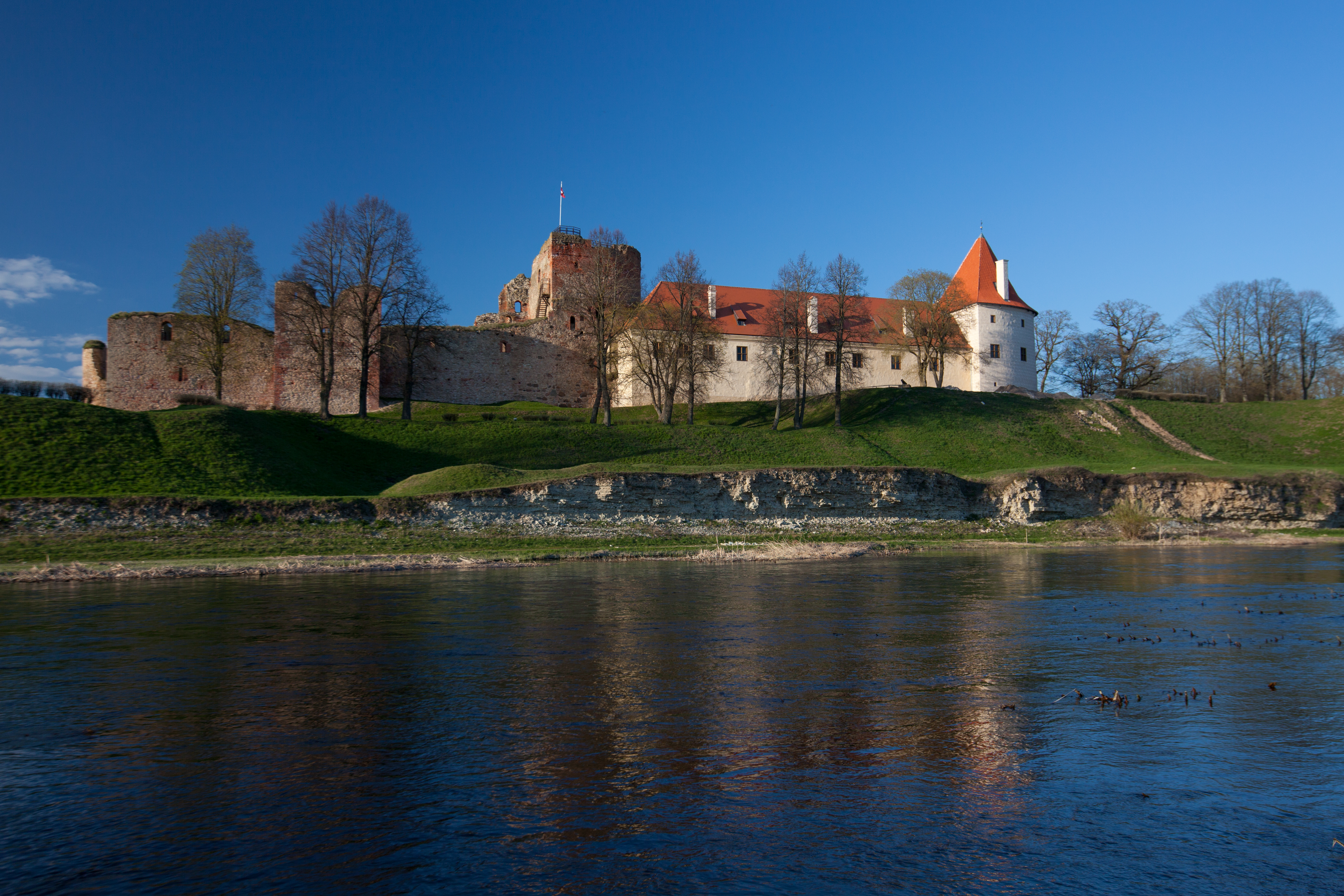 Bauskas dolomīta atsegumi